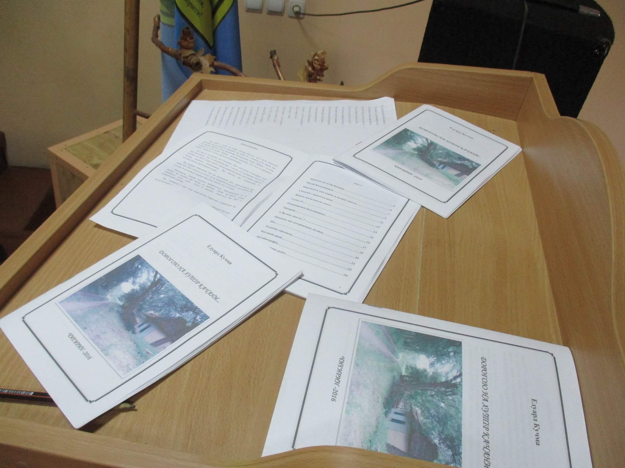 збірнички